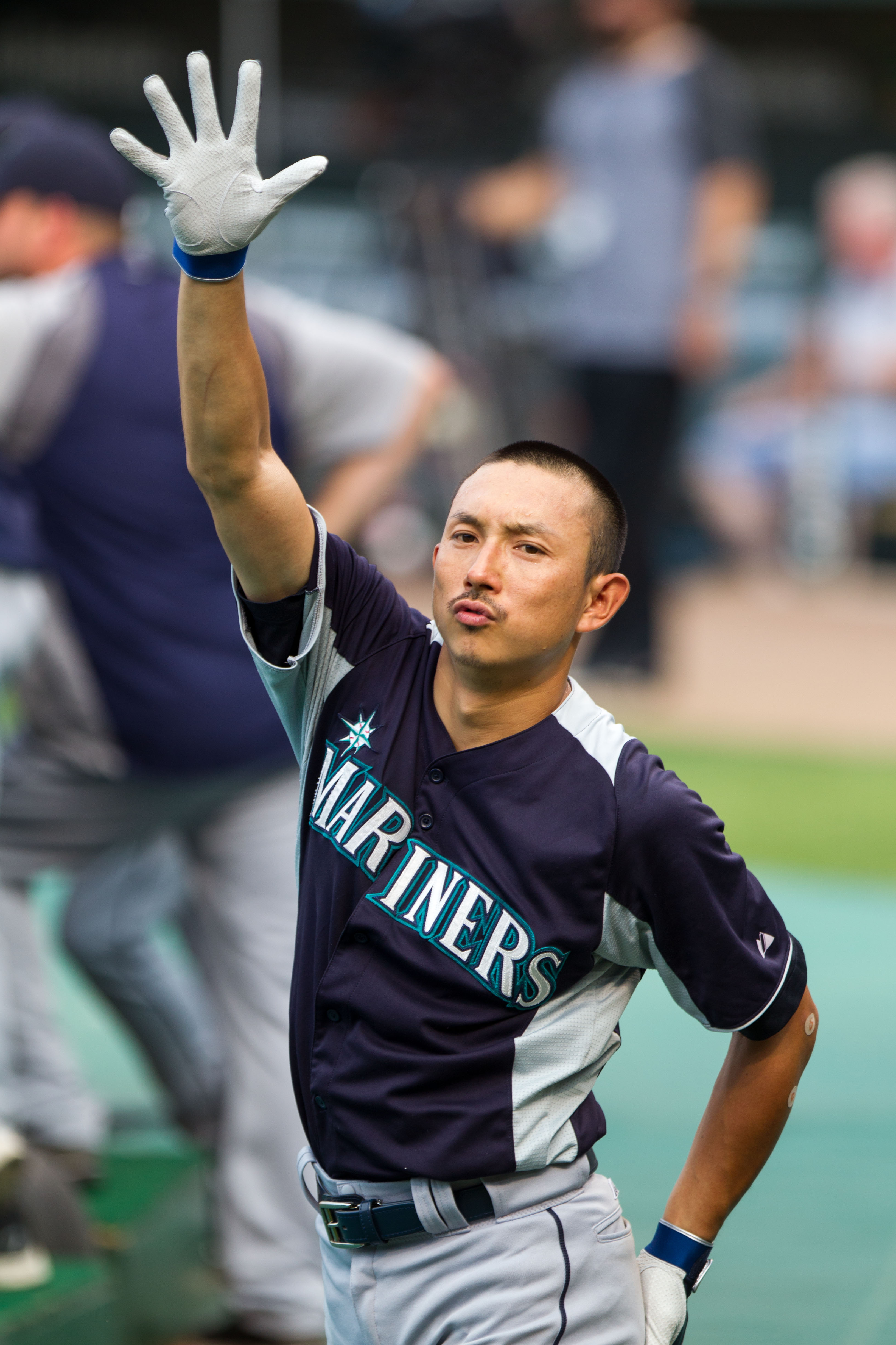 Munenori Kawasaki